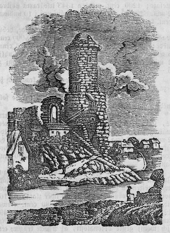 Hrad Jenštejn